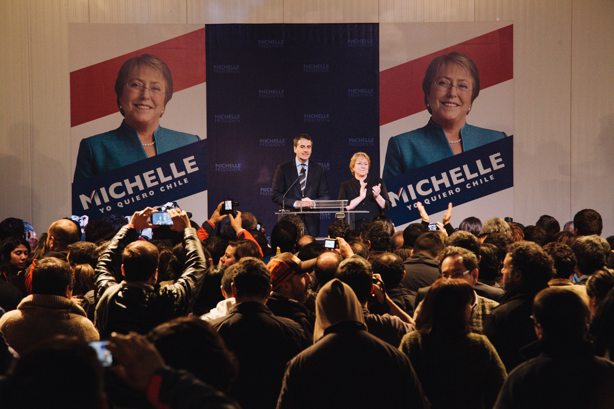 Andrés Velasco da su respaldo a Michelle Bachelet en las primarias de 2013.